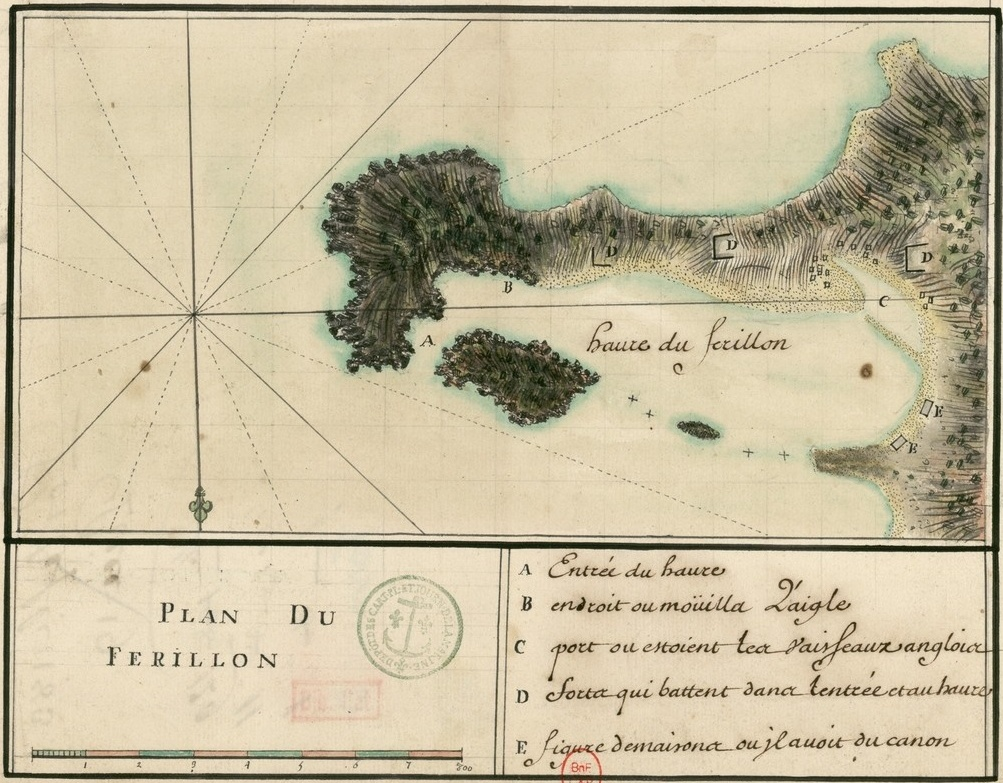 Carte relatant le combat du Forillon en septembre 1694 lors de l'attaque de quatre vaisseaux français. Position des batteries anglaises à terre et du vaisseau français l'Aigle, échoué temporairement pendant le combat. Terre-Neuve. Guerre de la Ligue d'Augsbourg, (1688 - 1697).